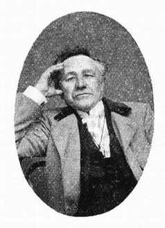 Ondřej Červíček (1844 - 1928), Český herec a principál kočovné herecké společnosti.